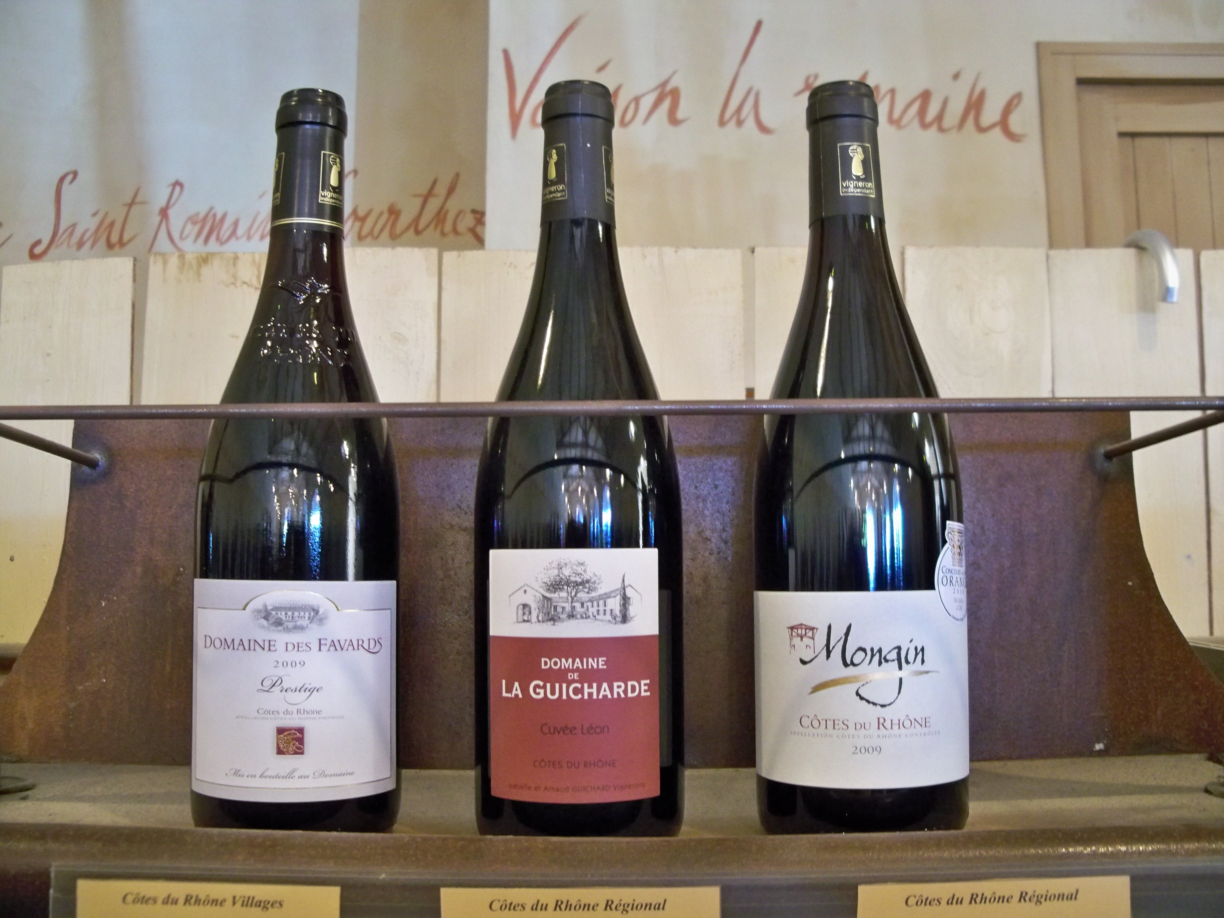 bouteilles de Cotes du Rhone